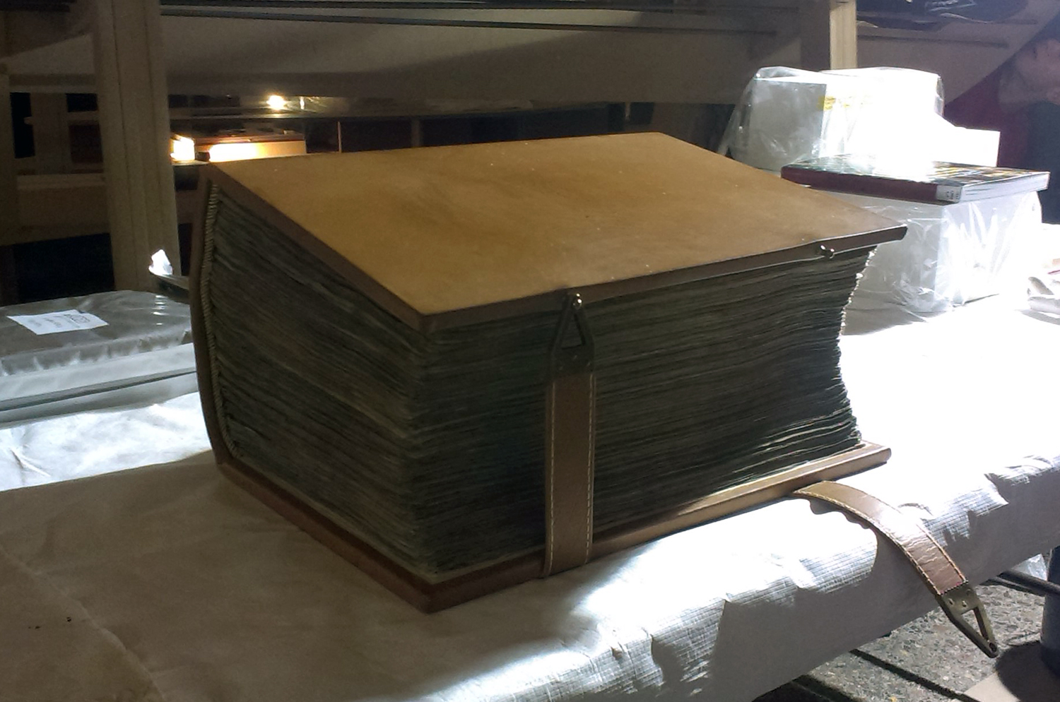 Codex Amiatinus